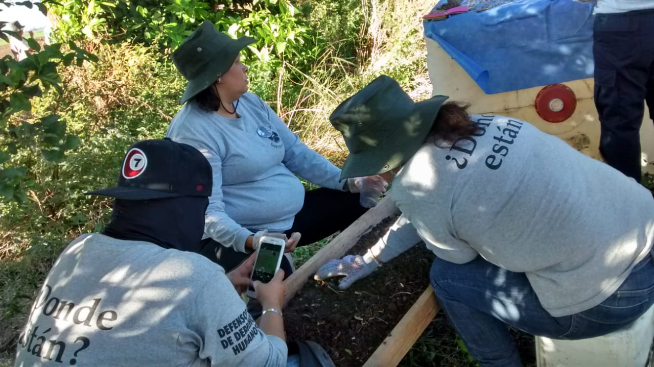 Mujeres que realizan la búsqueda de restos de personas desaparecidas en México.